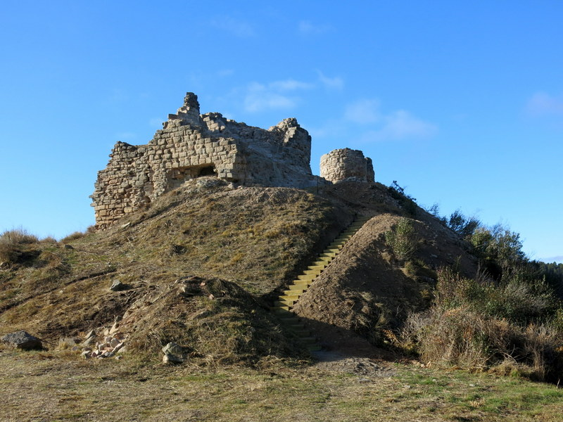 Castell de Jorba, comarca Anoia, Catalunya